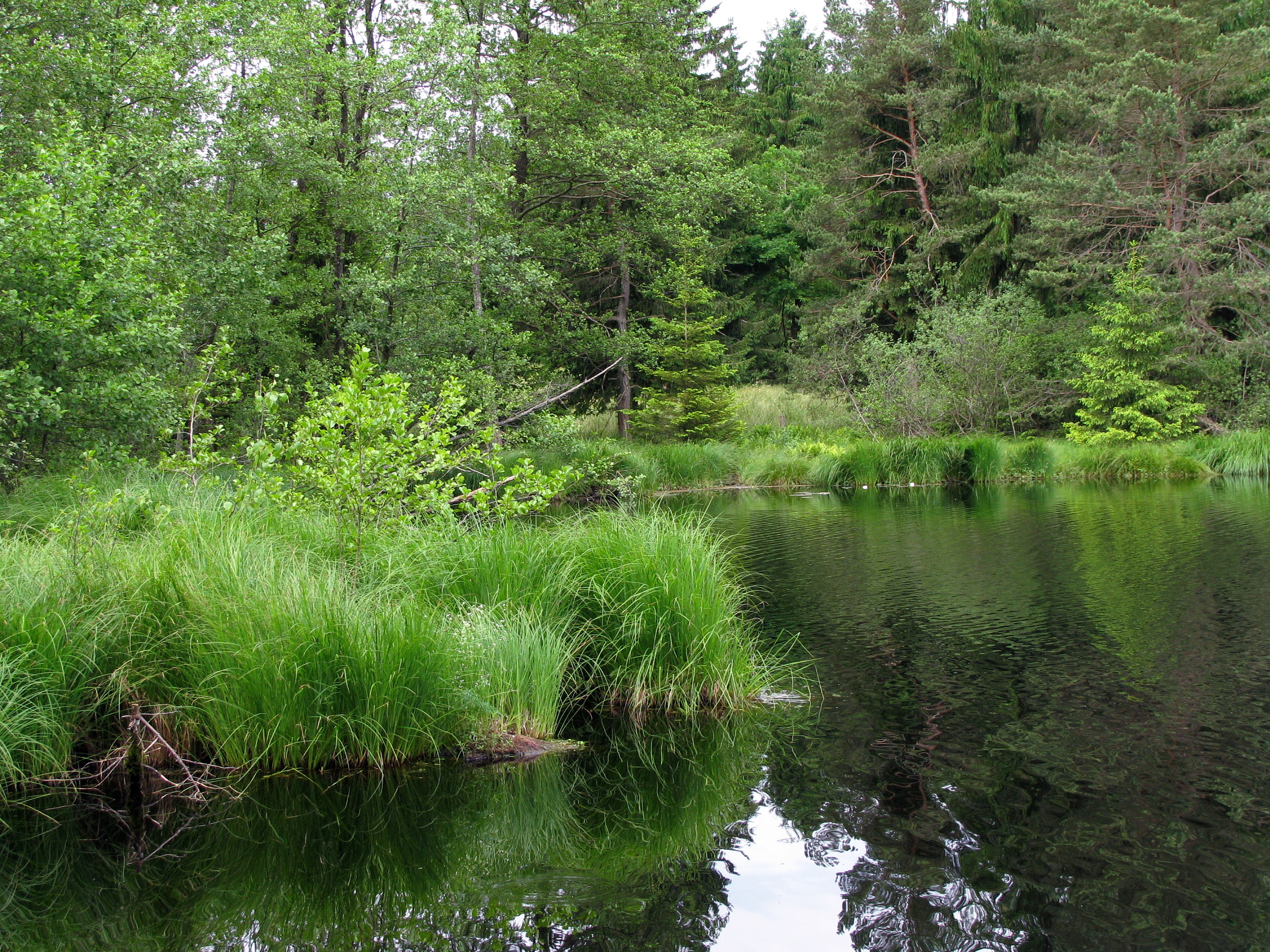 Naturdenkmal Buchner Weiher.